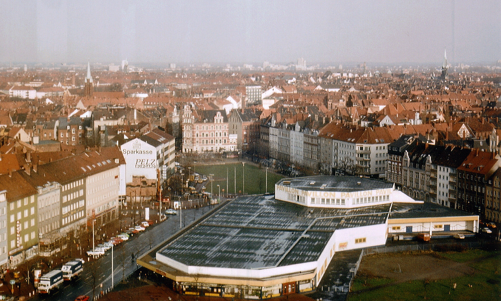 Kulturzentrum Pavillon, vorn links die Oststadtbibliothek, Teil der Stadtbibliothek Hannover, im Stadtteil Oststadt und baulich mit dem Pavillon verbunden.